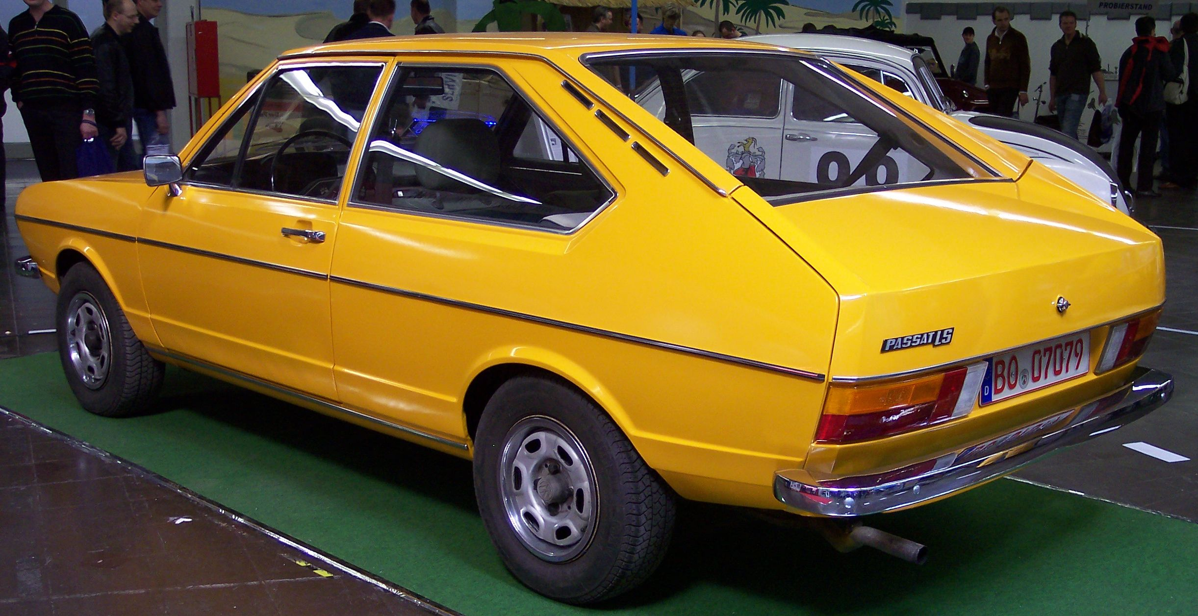 VW Passat 1974